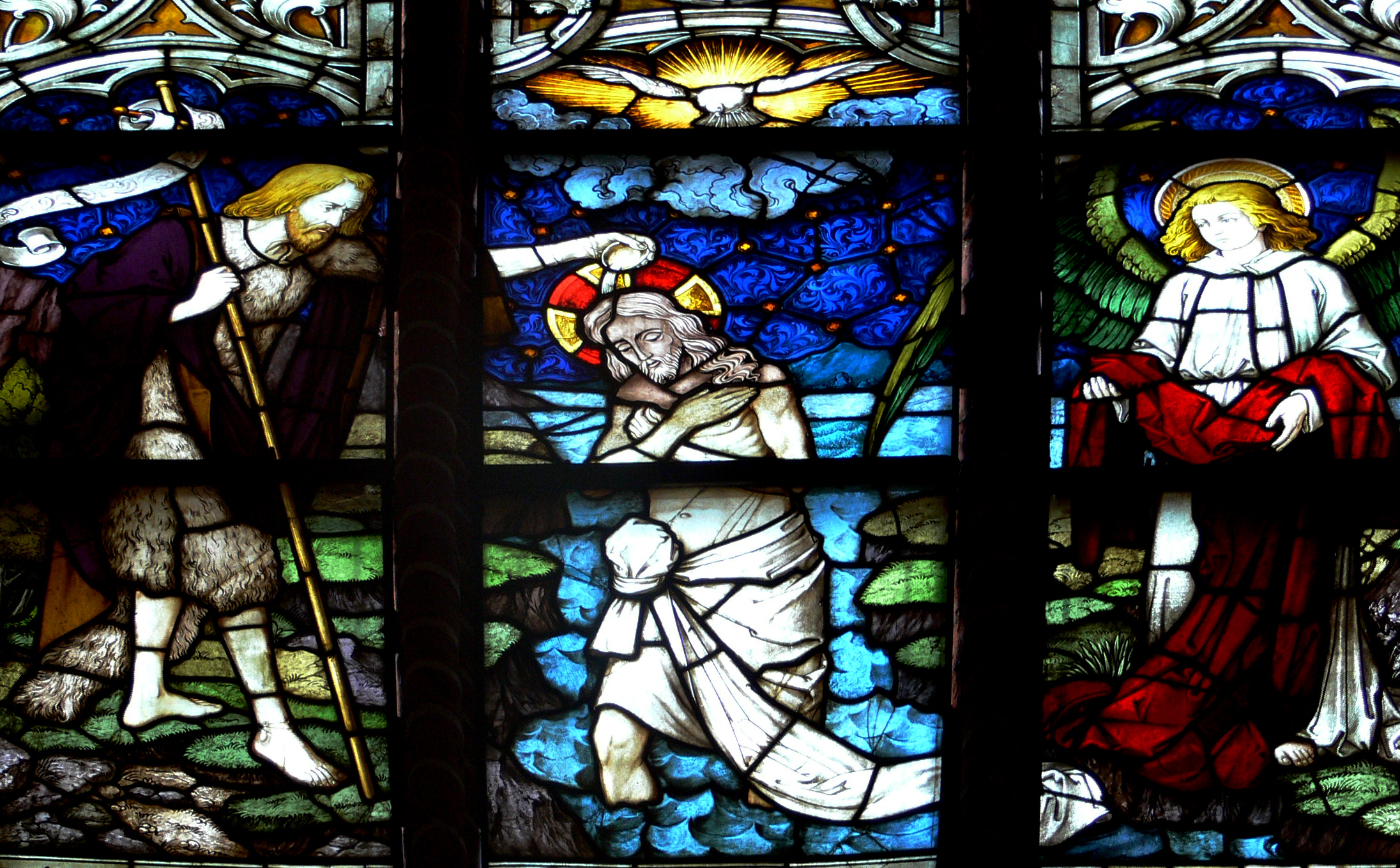 Lüneburg, Kirche St. JohannisMittleres Chorfenster von Karl de Bouché (1906 von Kaiser Wilhelm II. gestiftet): Taufe Jesu